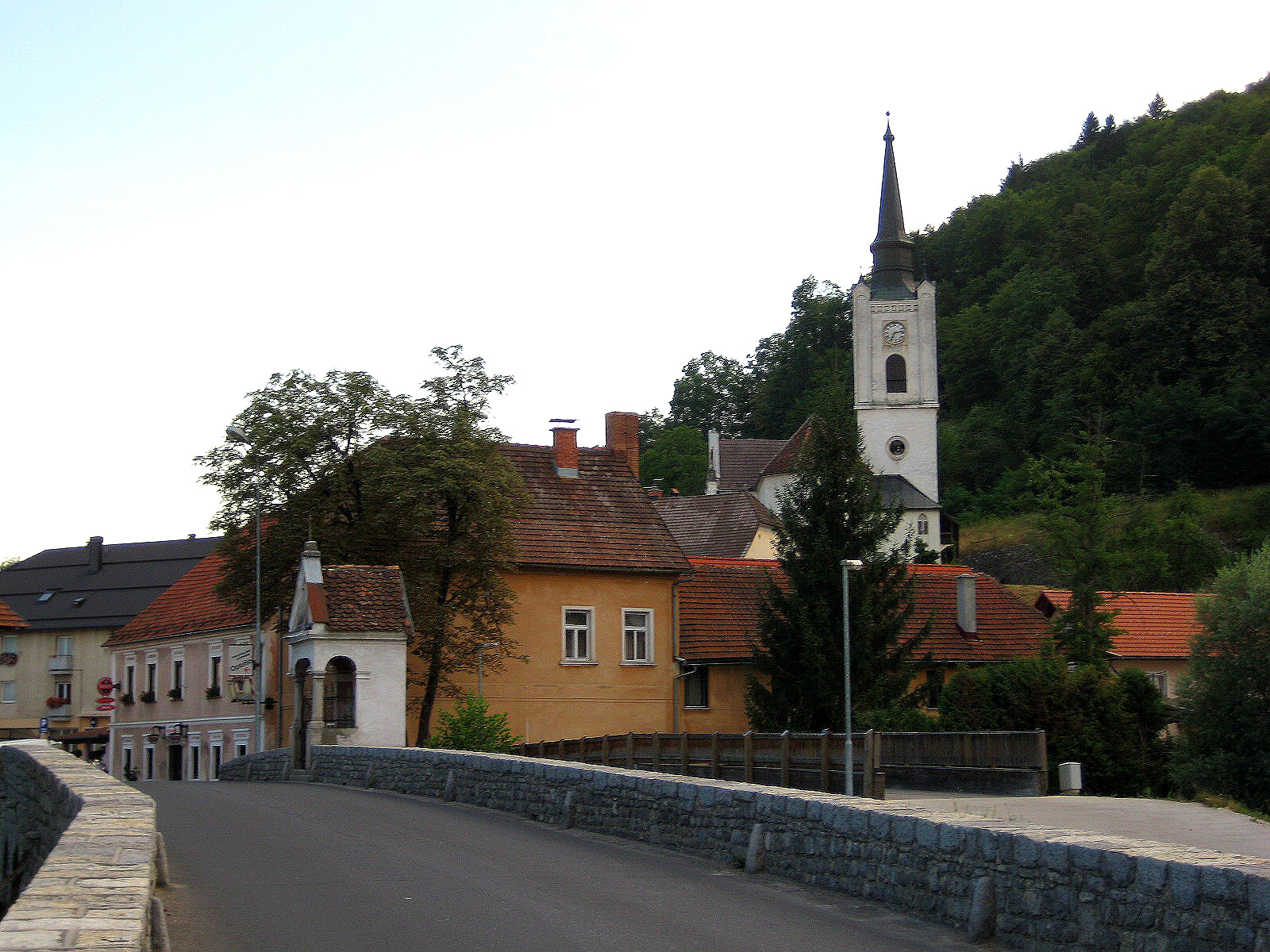 Mirna, town in Slovenia